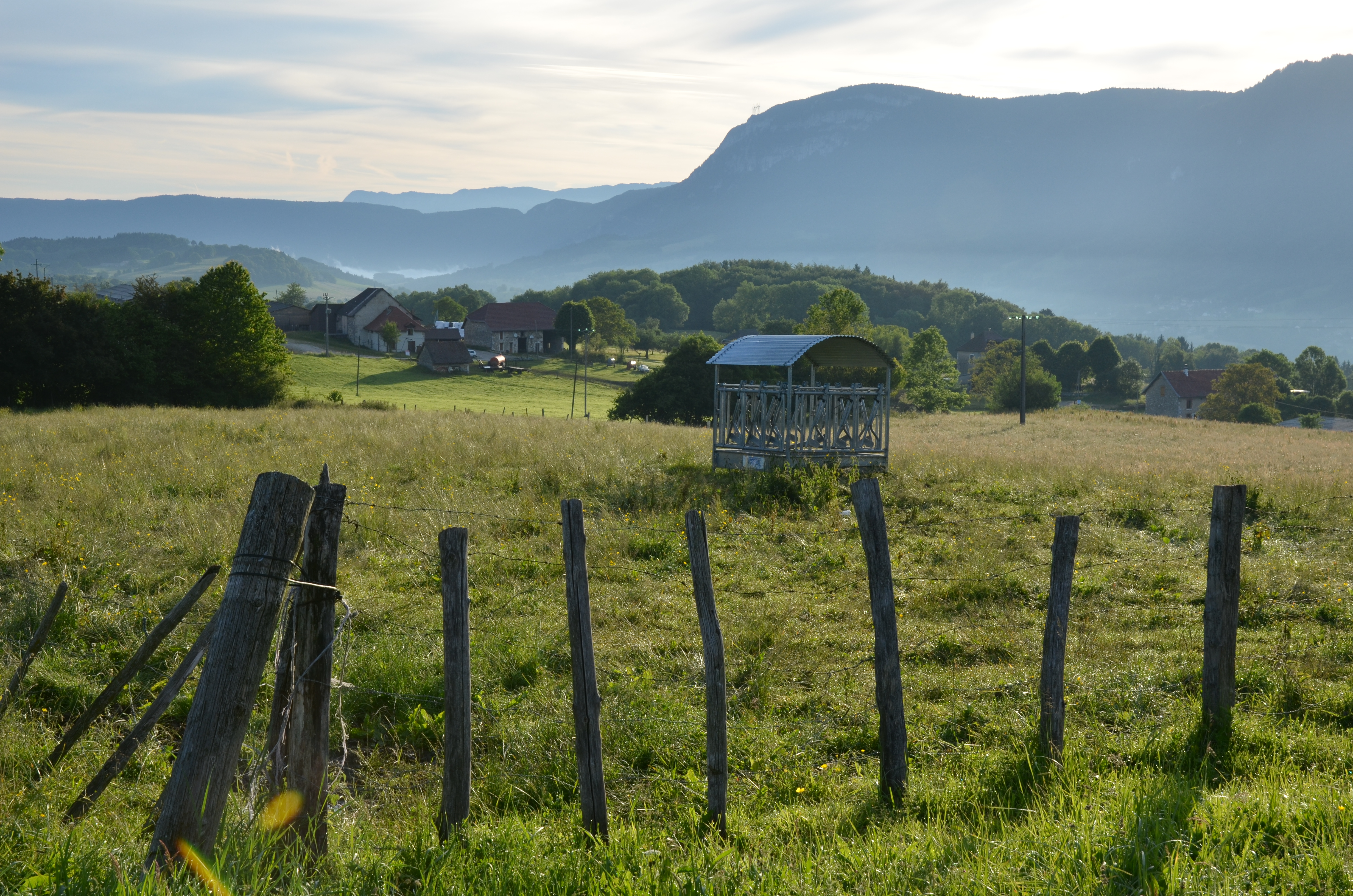 38380 Miribel-les-Échelles, France